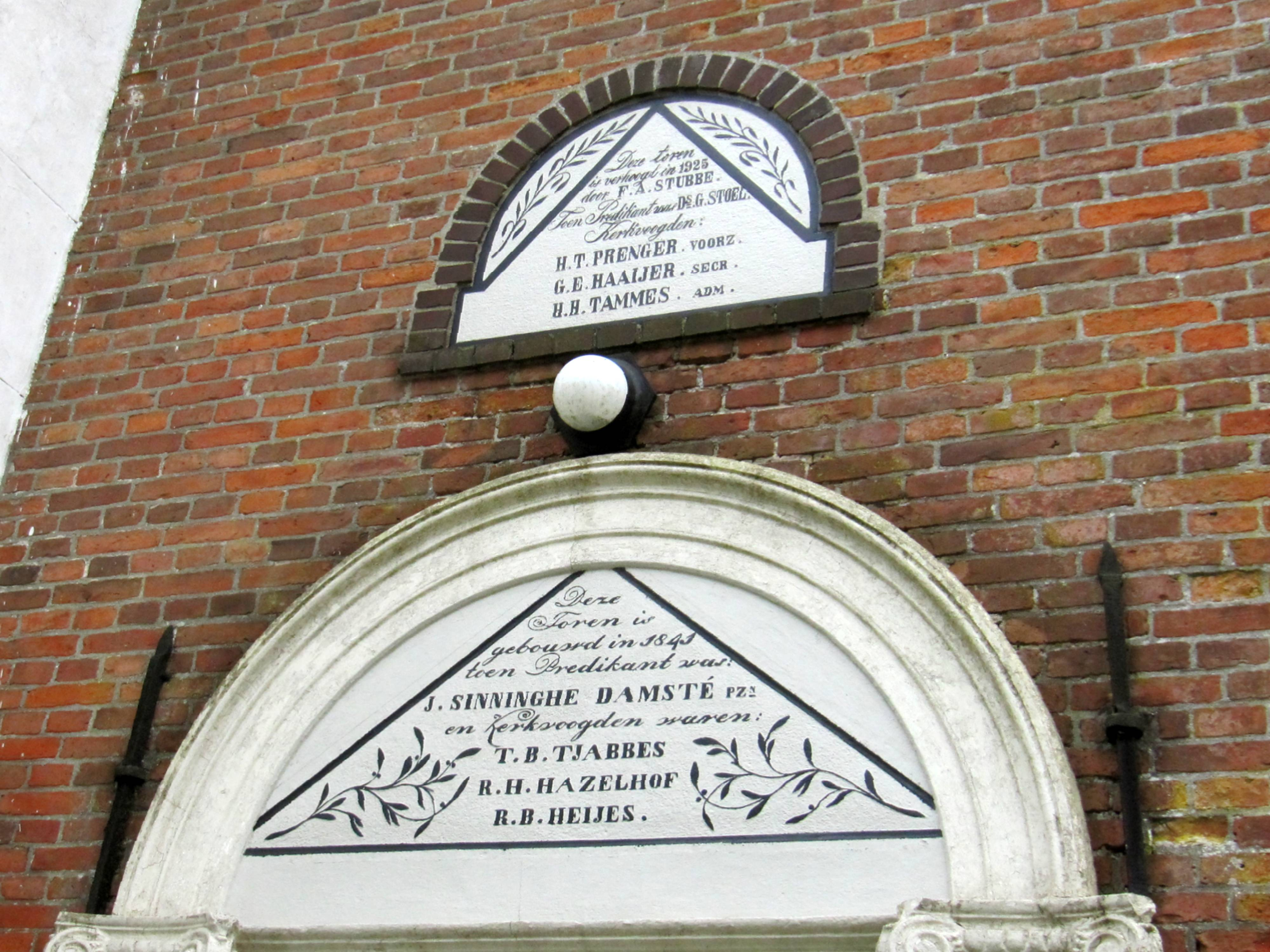 Even buiten de dorpskom gelegen kerkgebouw uit 1717 met toren waarvan het benedendeel uit 1841 en het bovendeel uit 1925 stamt.